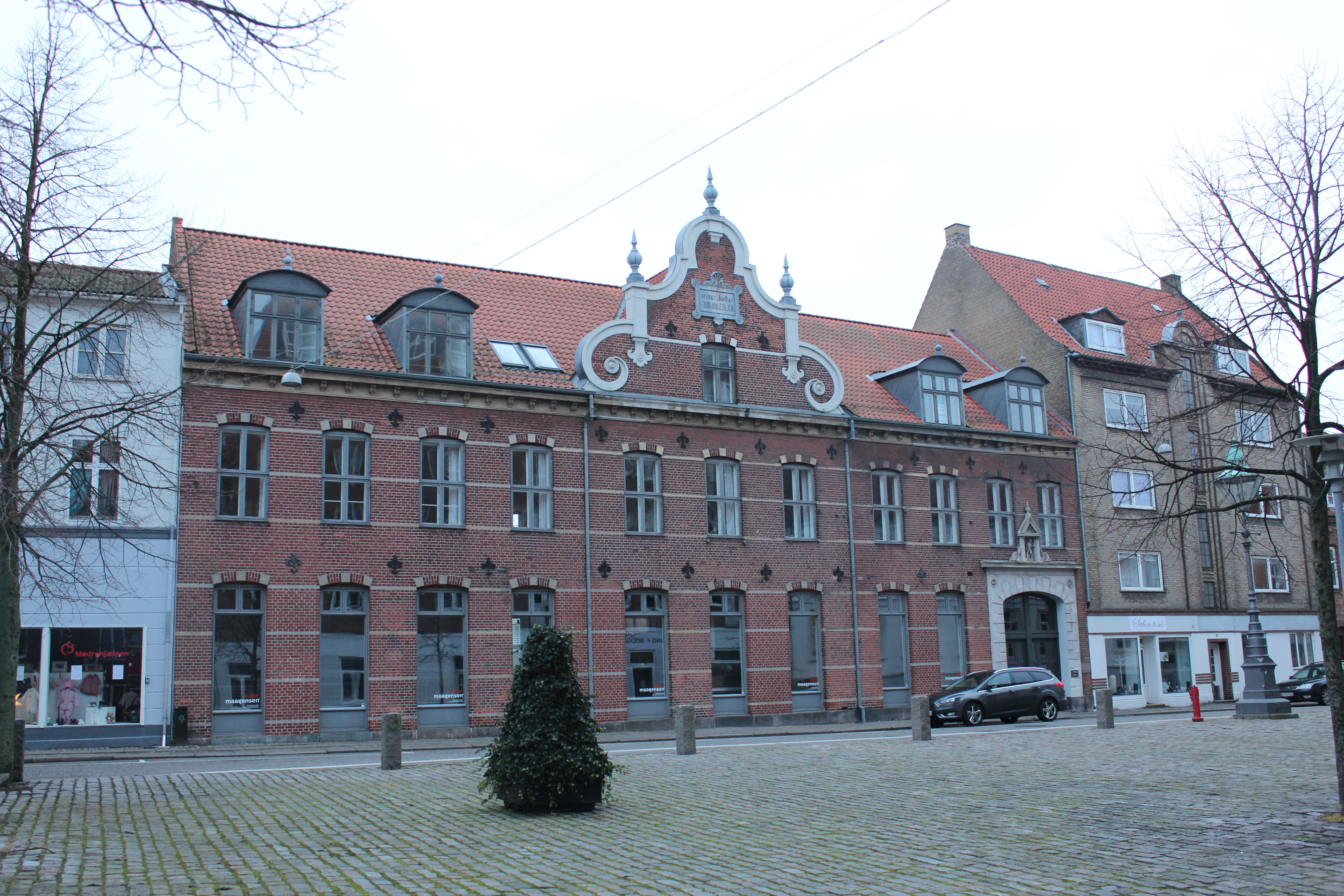 Bygning i Nykøbing Falster opført i 1860 af Chr. Dresler.